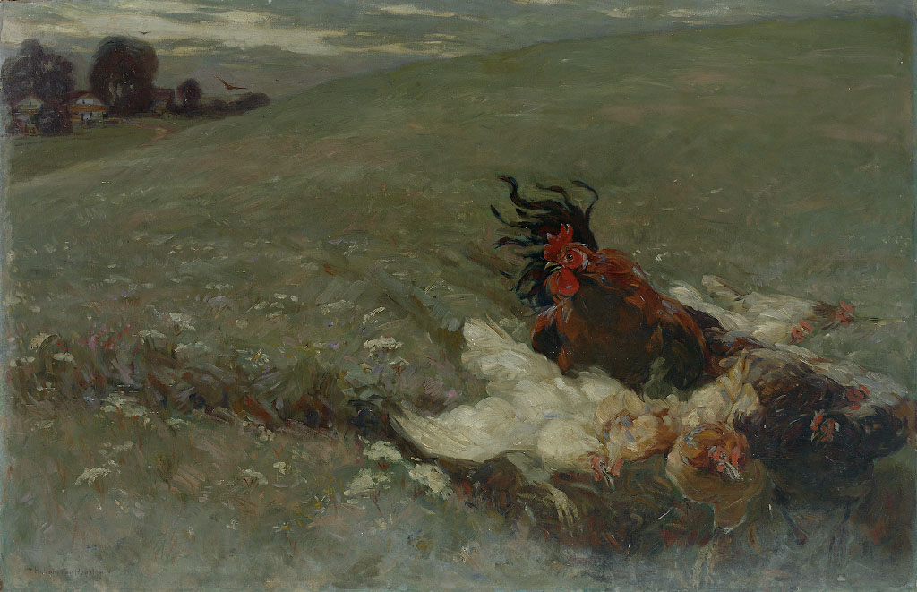 Hahn mit Hühnerschar, Öl auf Leinwand, 110 x 170 cm